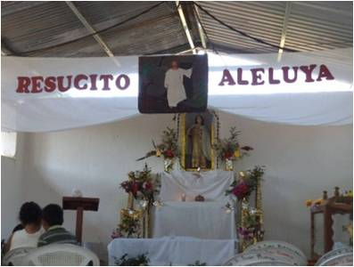 una experiencia extraordinaria 2017